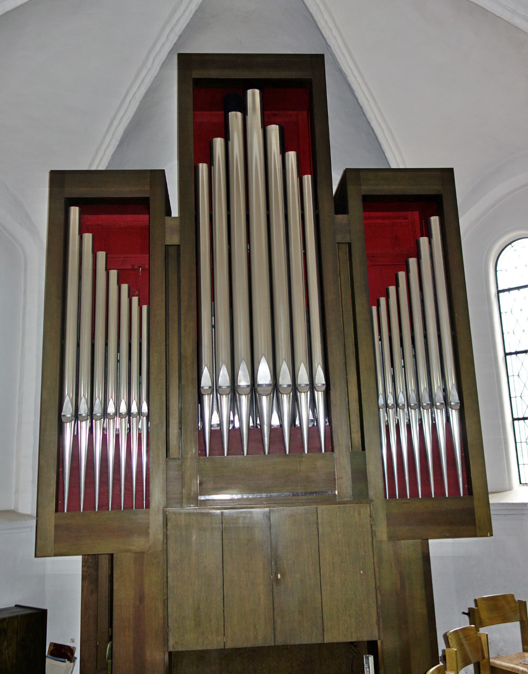 Orgel in Lübeck, St.-Jürgen-Kapelle, Schleswig-Holstein